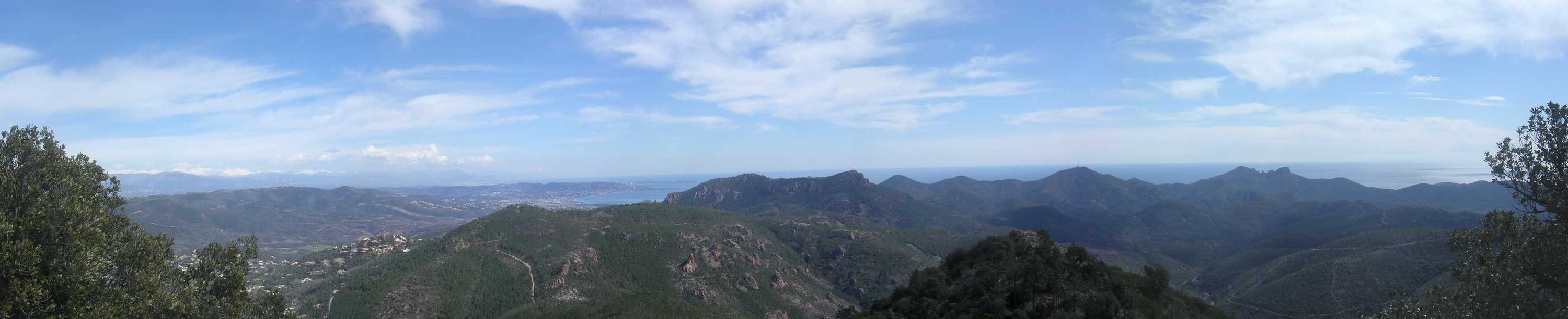 Vue panoramique sur les Monts de l'Esterel (Pic de l'Ours, Cap roux), au loin les Monts du mercantour.